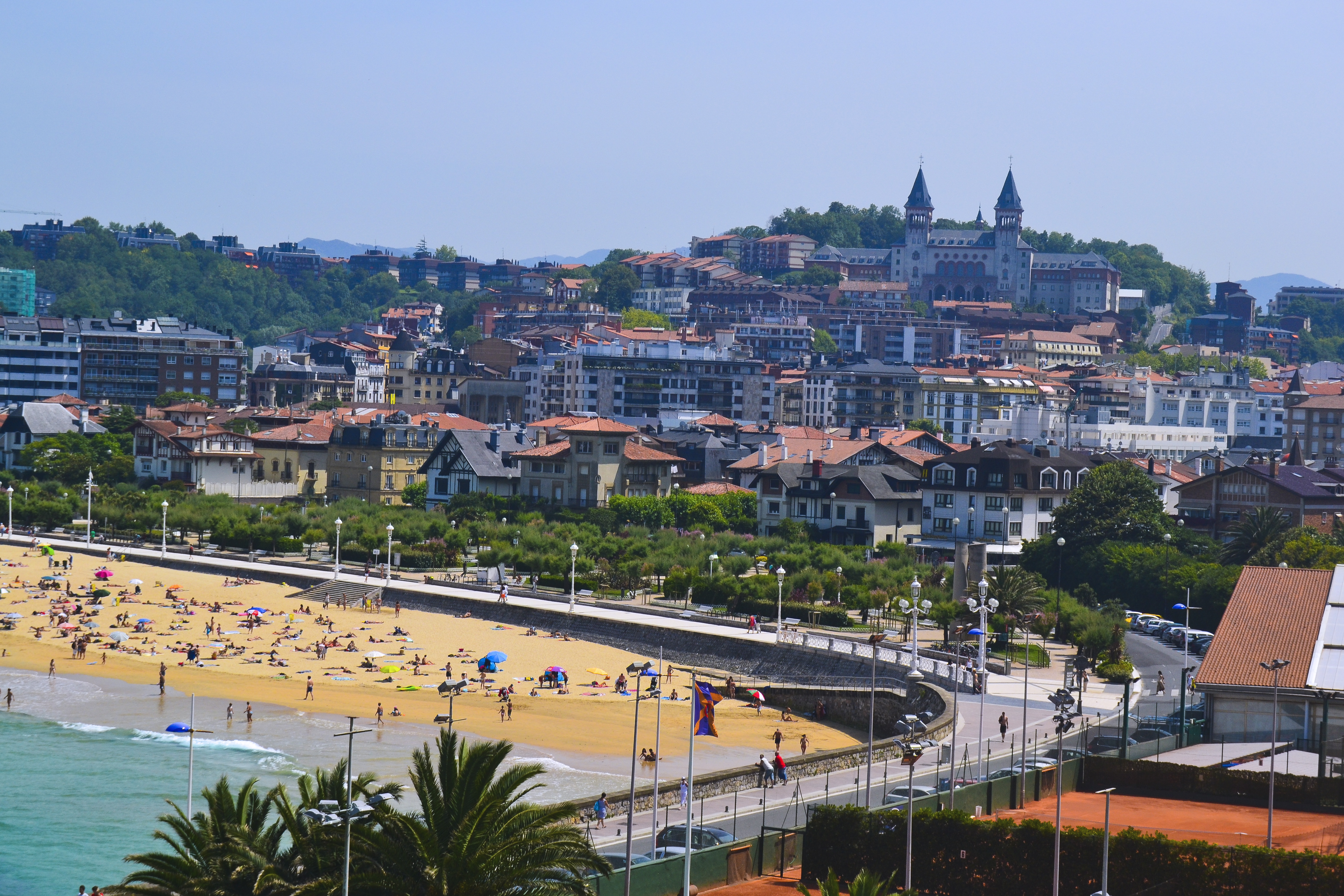 Ondarreta eta Antiguo. Donostia, Gipuzkoa. Euskal Herria. Ondarreta and Antiguo. Saint Sebastian, Gipuzkoa. Basque Country.